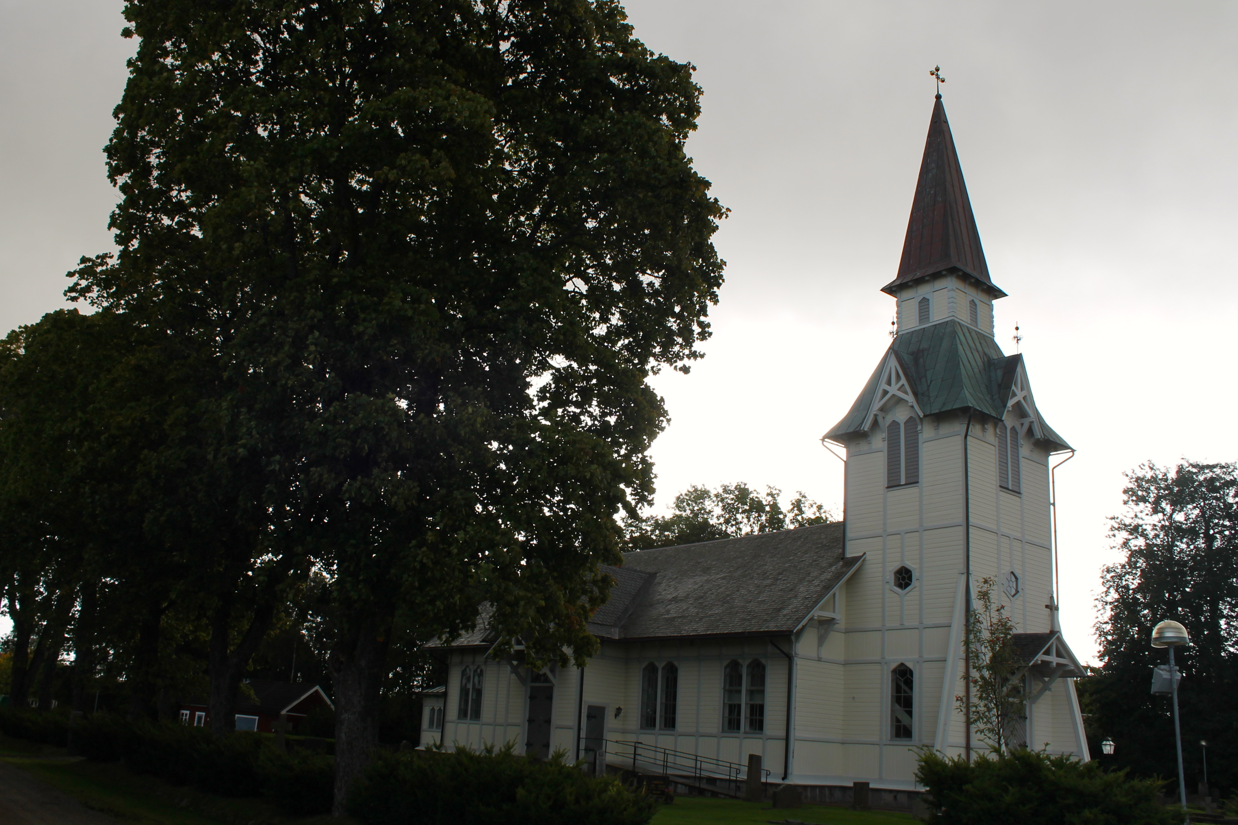 Naums kyrka (Naum 13:1)